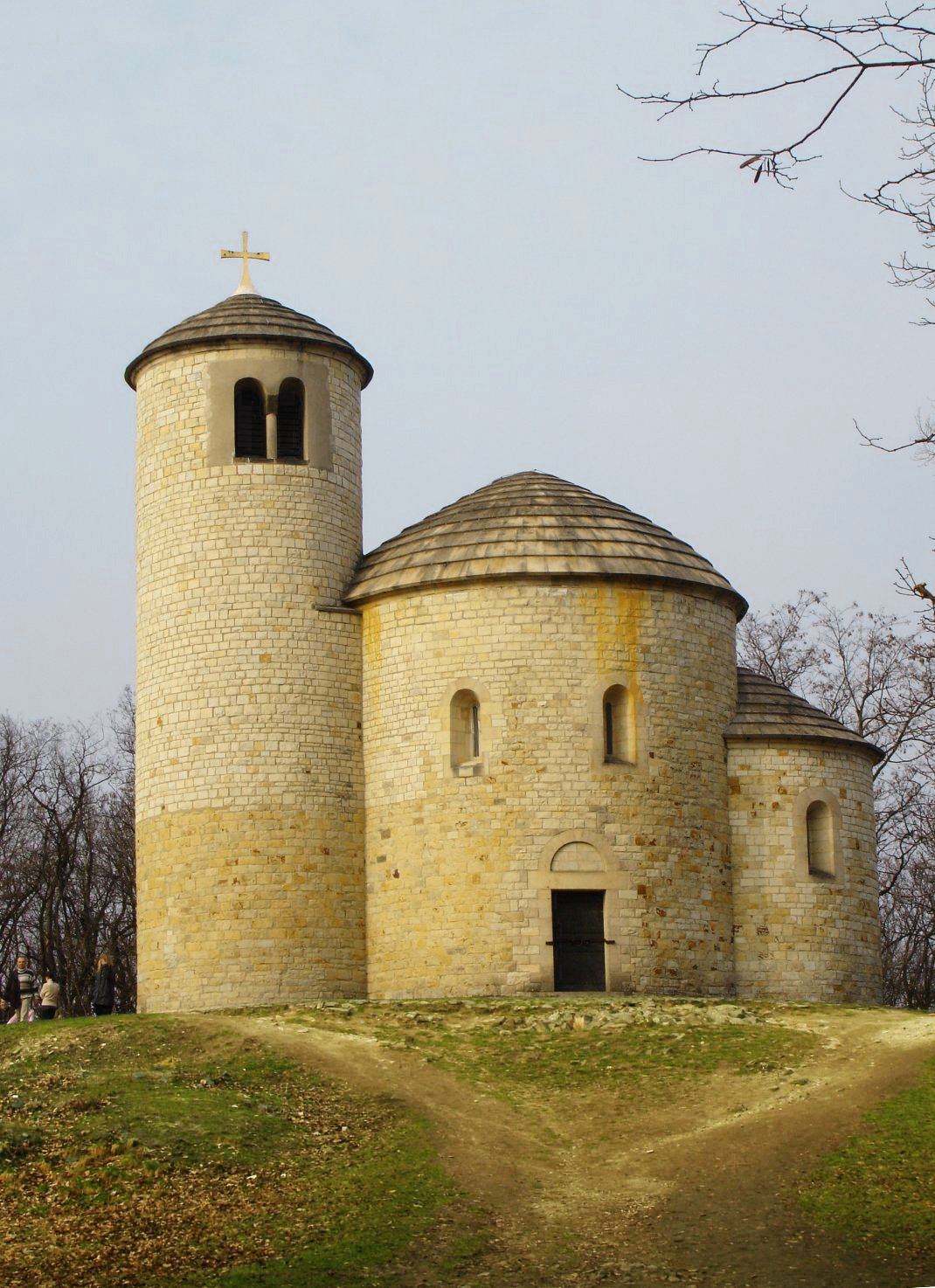 Rotunda sv. Jiří na Řípu, upraveno - vyvážení barev